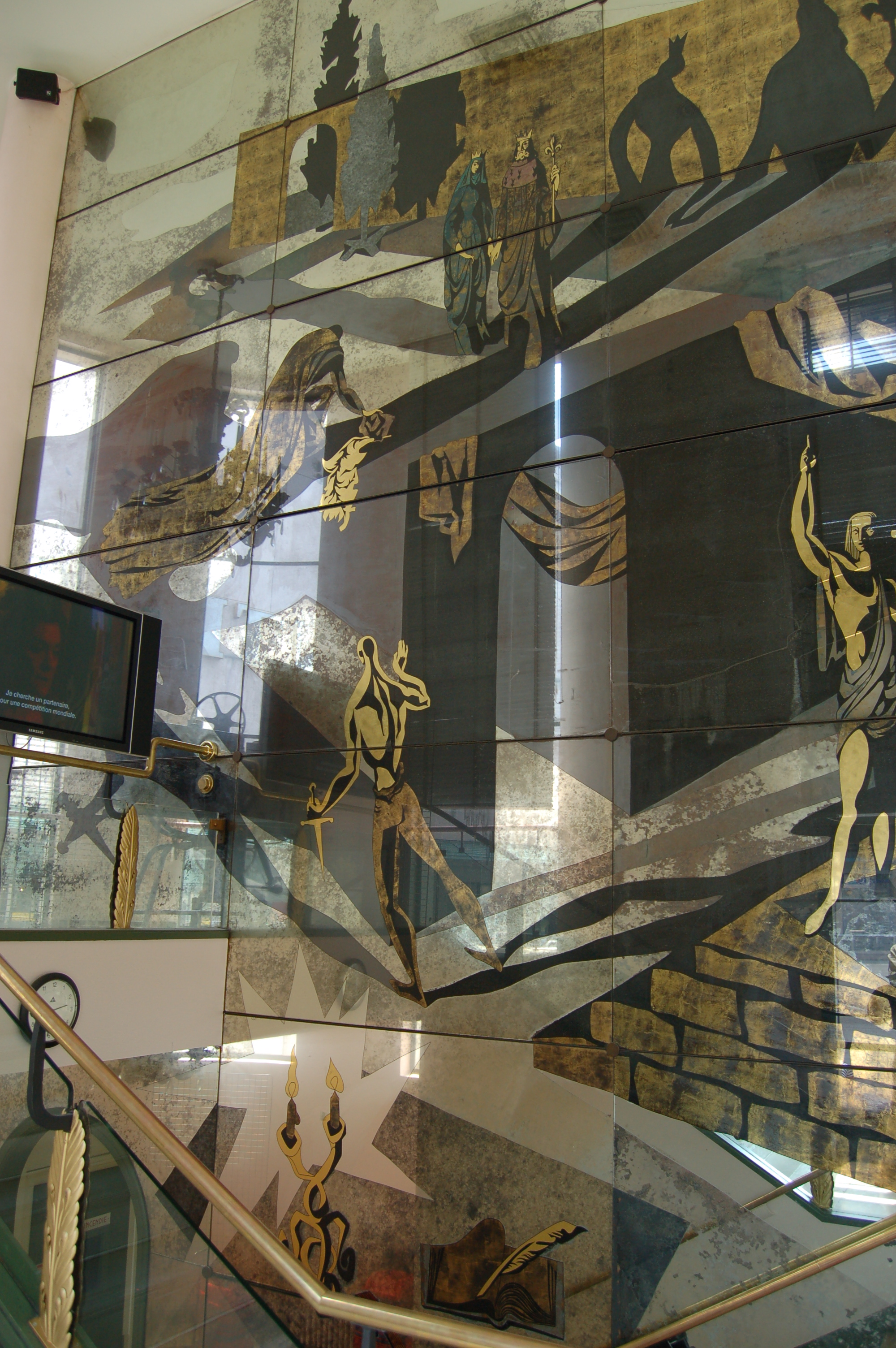 Décor du hall du théâtre municipal de Poitiers, par Robert Pansart